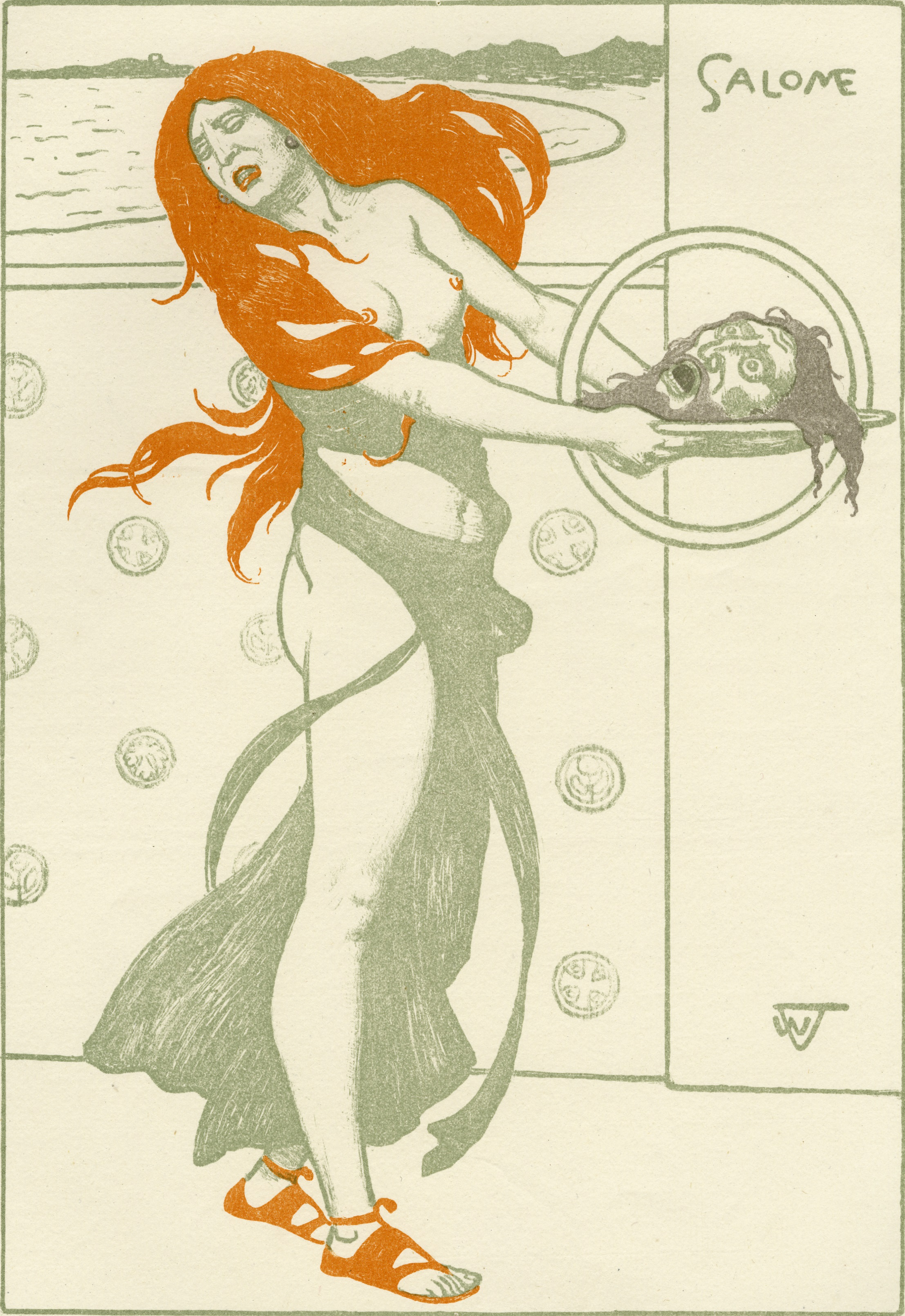 Salome, Farblithographie, 48 x 32 cm. Erschienen in der Zeitschrift „Pan“, eine von insgesamt acht Schmuckzeichnungen im zweiten und im vierten Jahrgang.